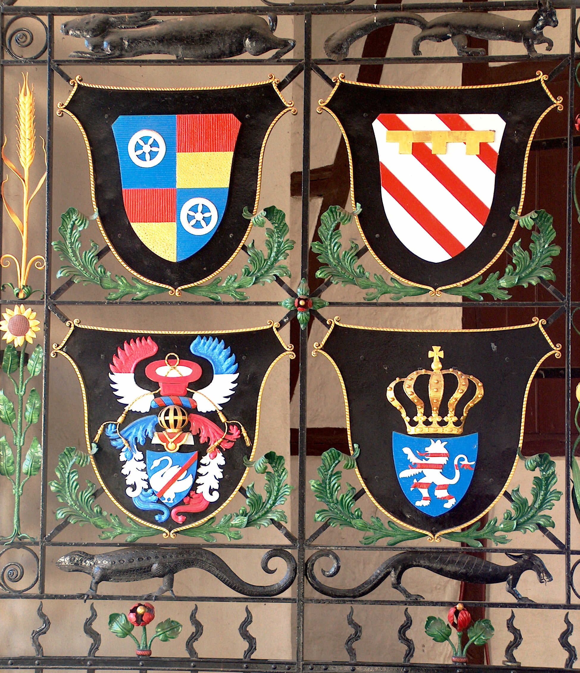 Wappen am Hoftor des Rettershofs in Kelkheim bei Frankfurt/Main